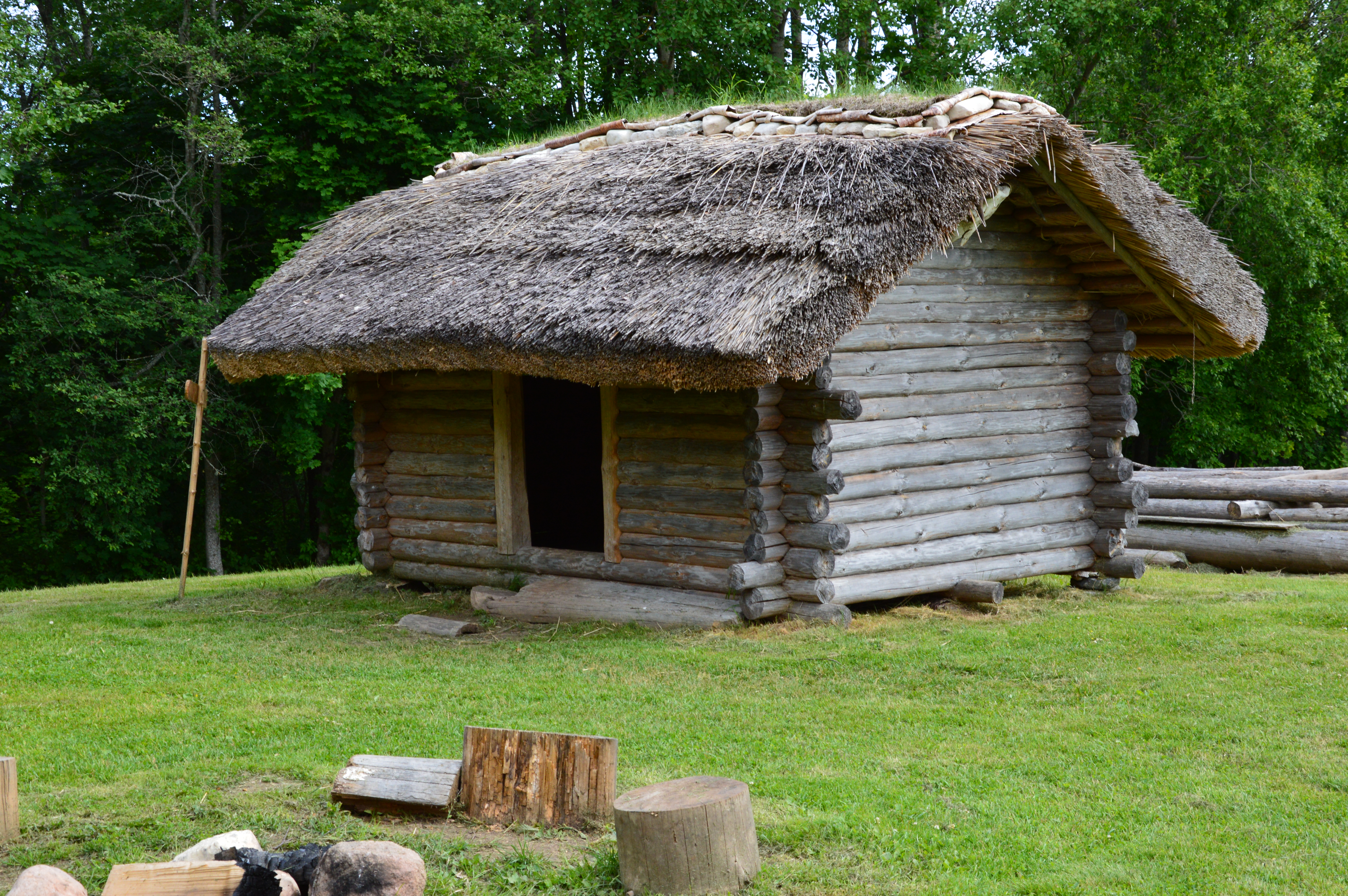 Rõuge muinastalu